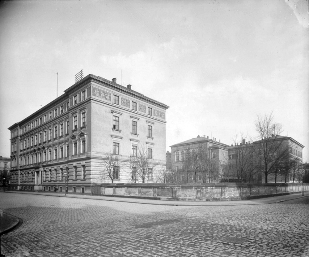 Alumnat der Thomaner, Hillerstraße 8; im Hintergrund die Neue Thomasschule, Schreberstraße 9